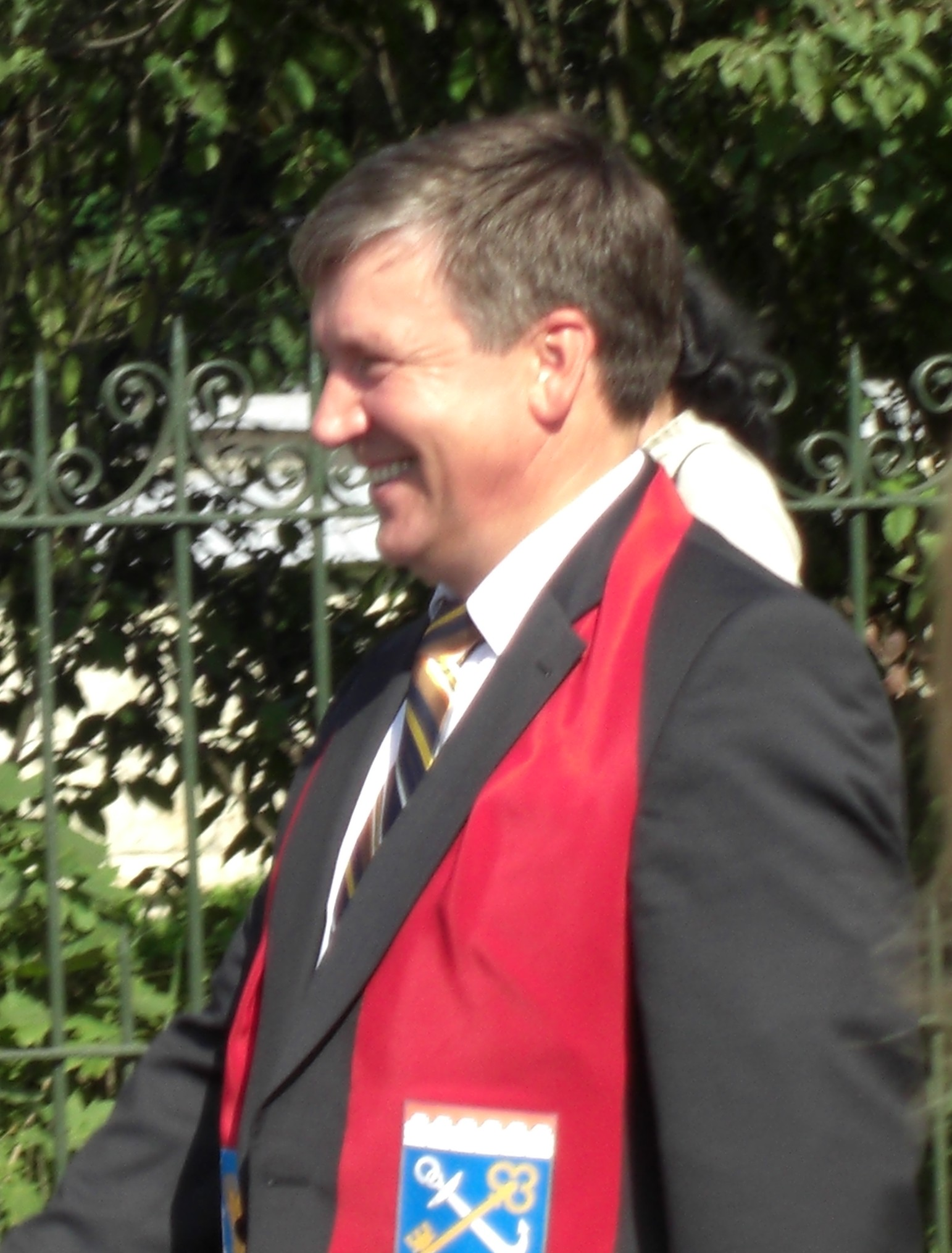 Худилайнен, Александр Петрович